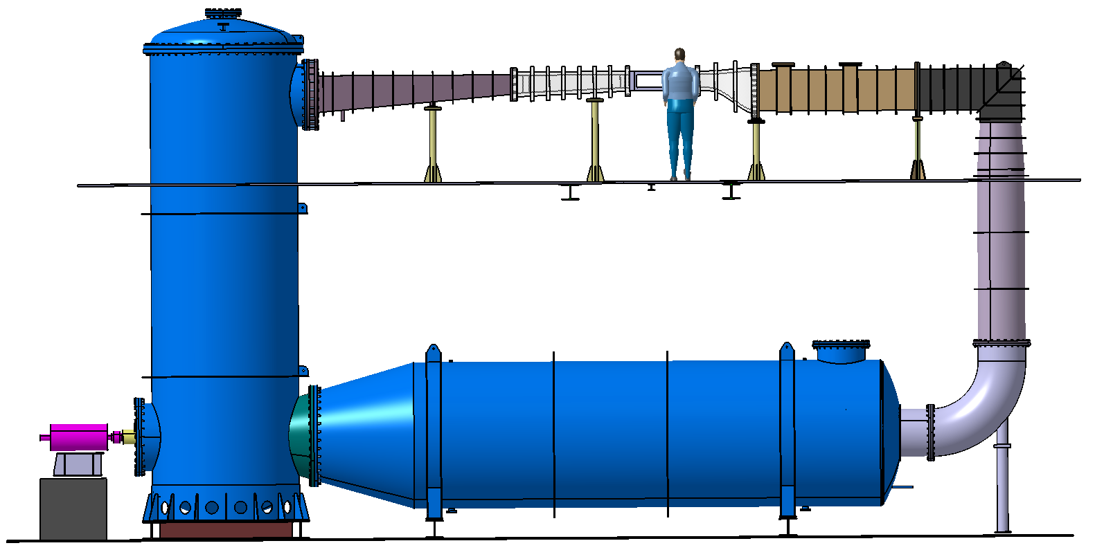 Tunnel de cavitation de l'Institut de Recherche de l'École navale